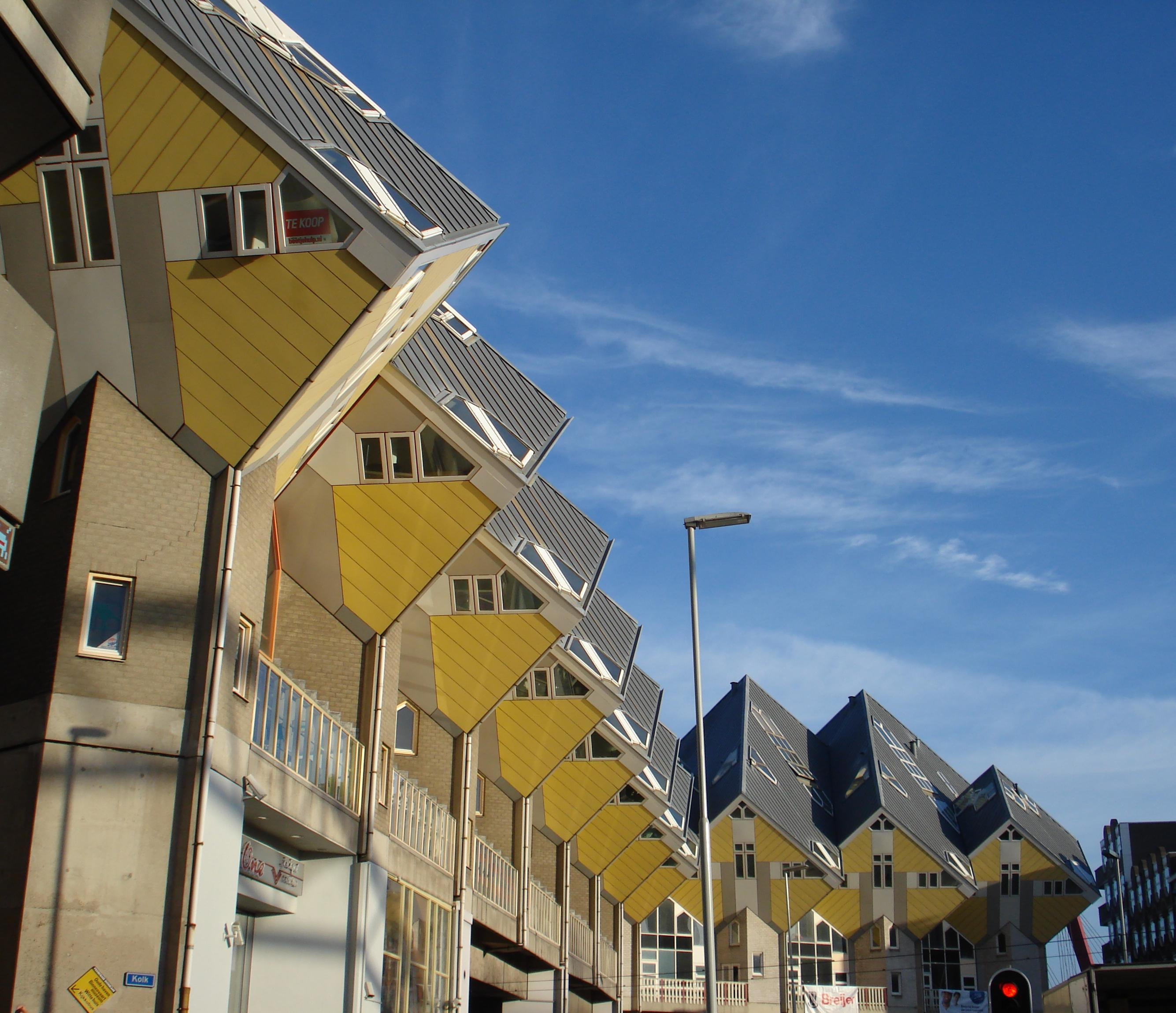 Rotterdam Blaak. Kubuswoningen.